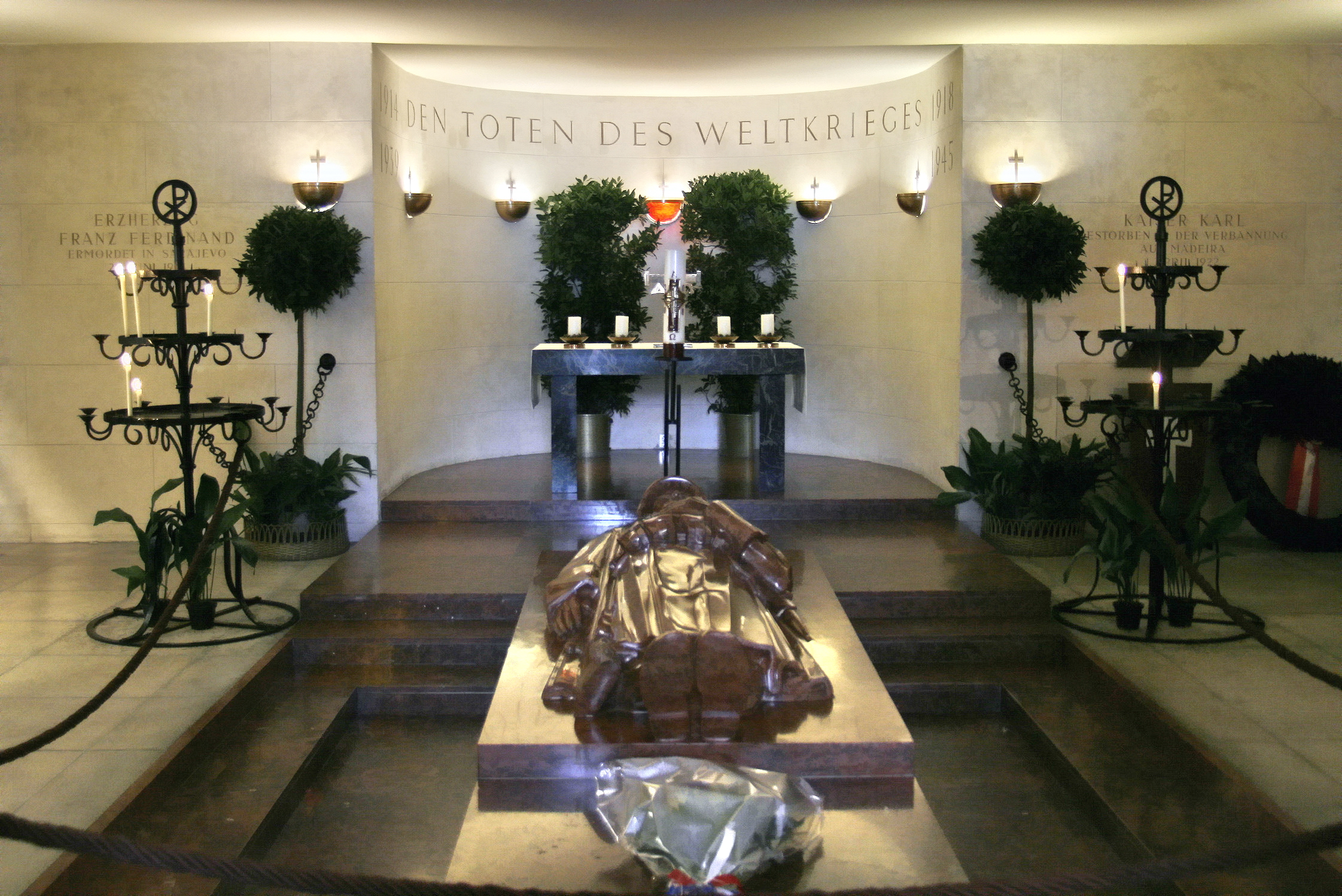 Die Krypta im Äußeren Burgtor in Wien.